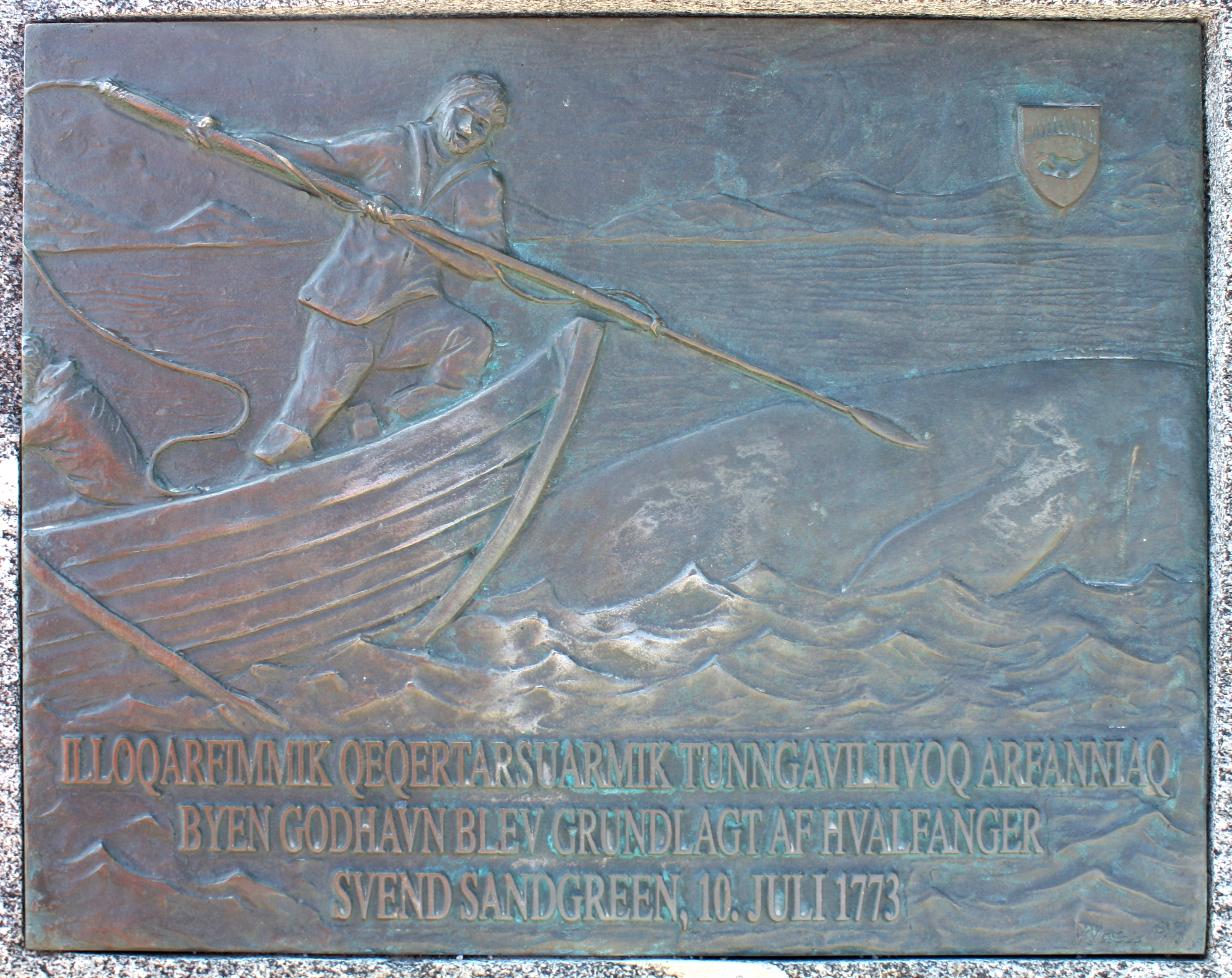 Gedenktafel für den Gründer Qeqertarsuaqs Svend Sandgreen, Qeqertarsuaq (Godhavn), Grönland.